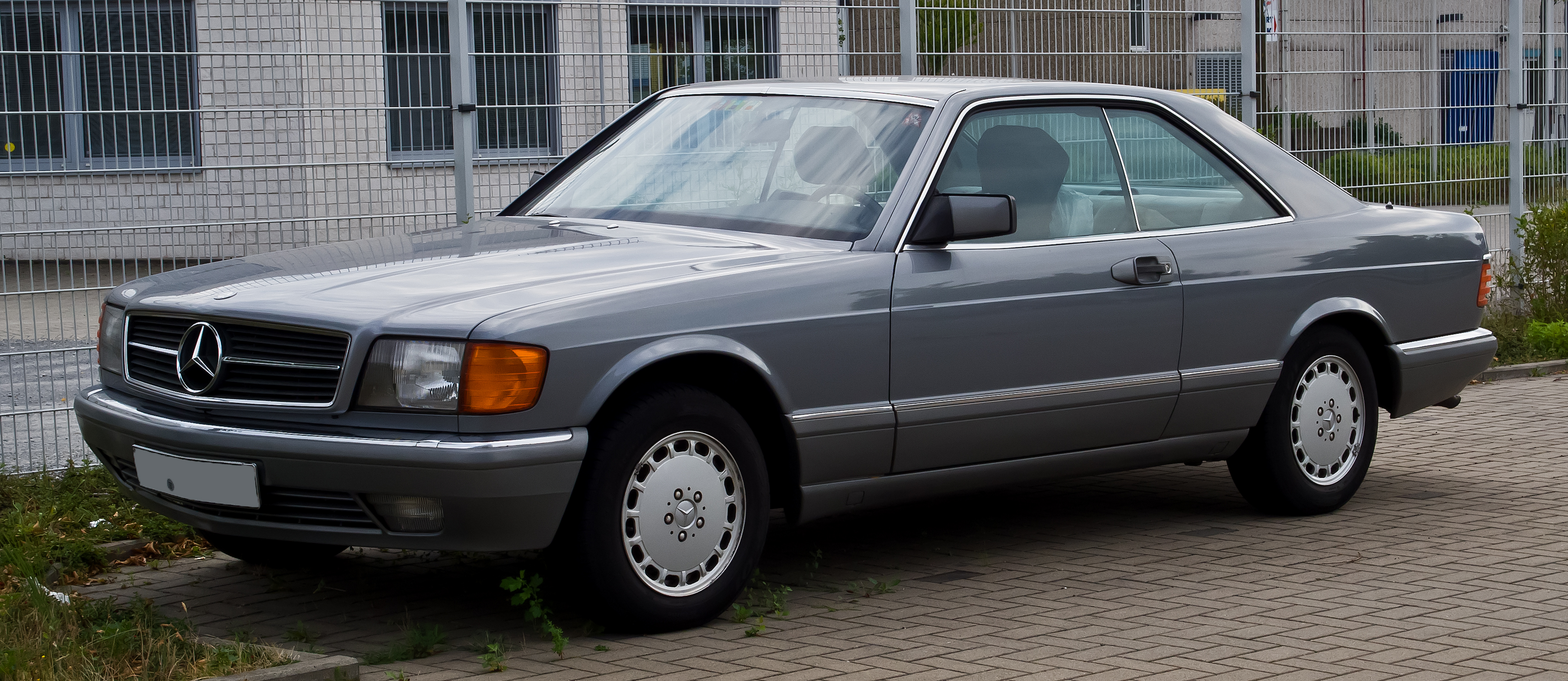 Mercedes-Benz 500 SEC (C 126, Facelift)